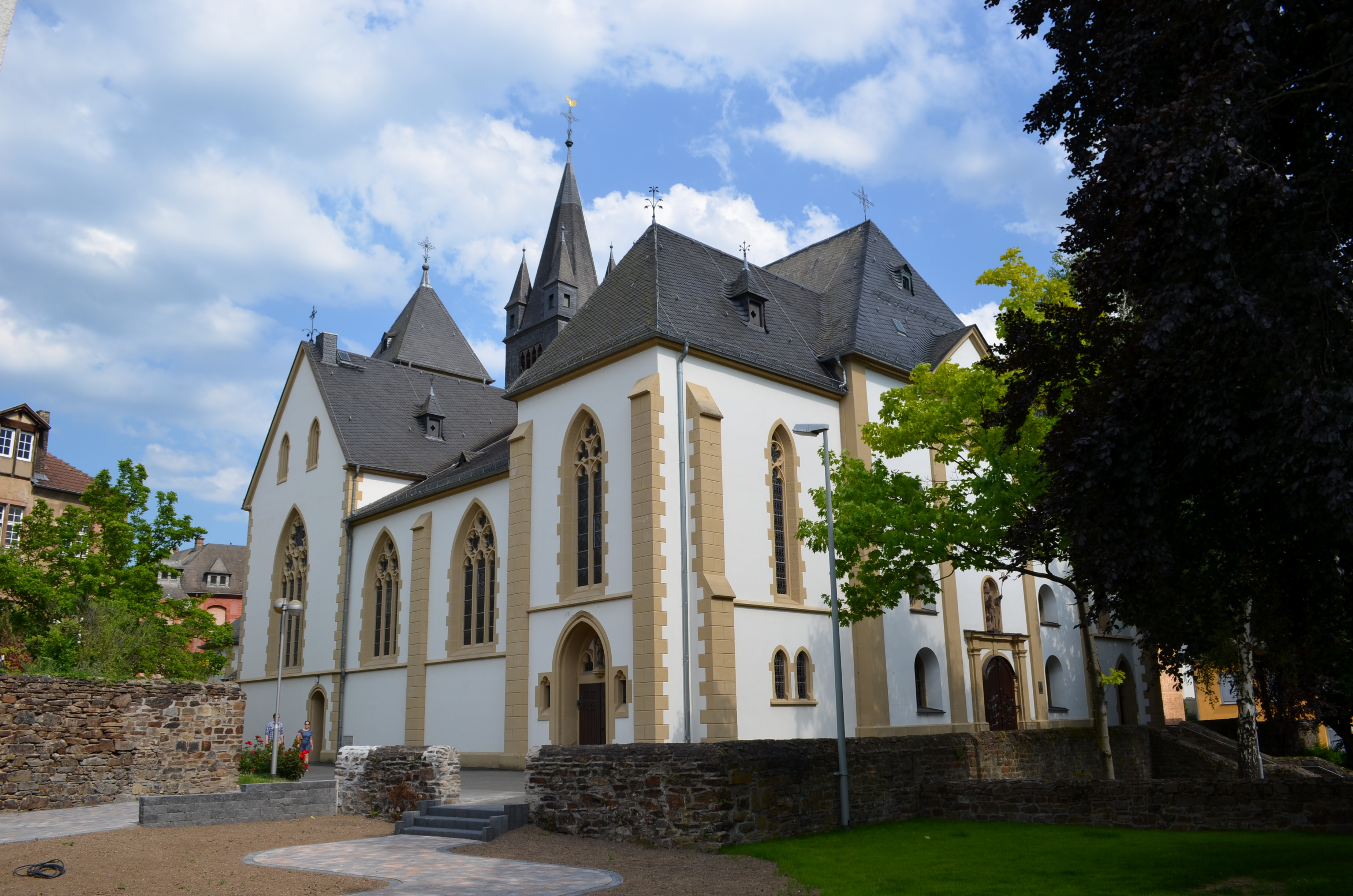 St. Martinus vanuit het noordwesten